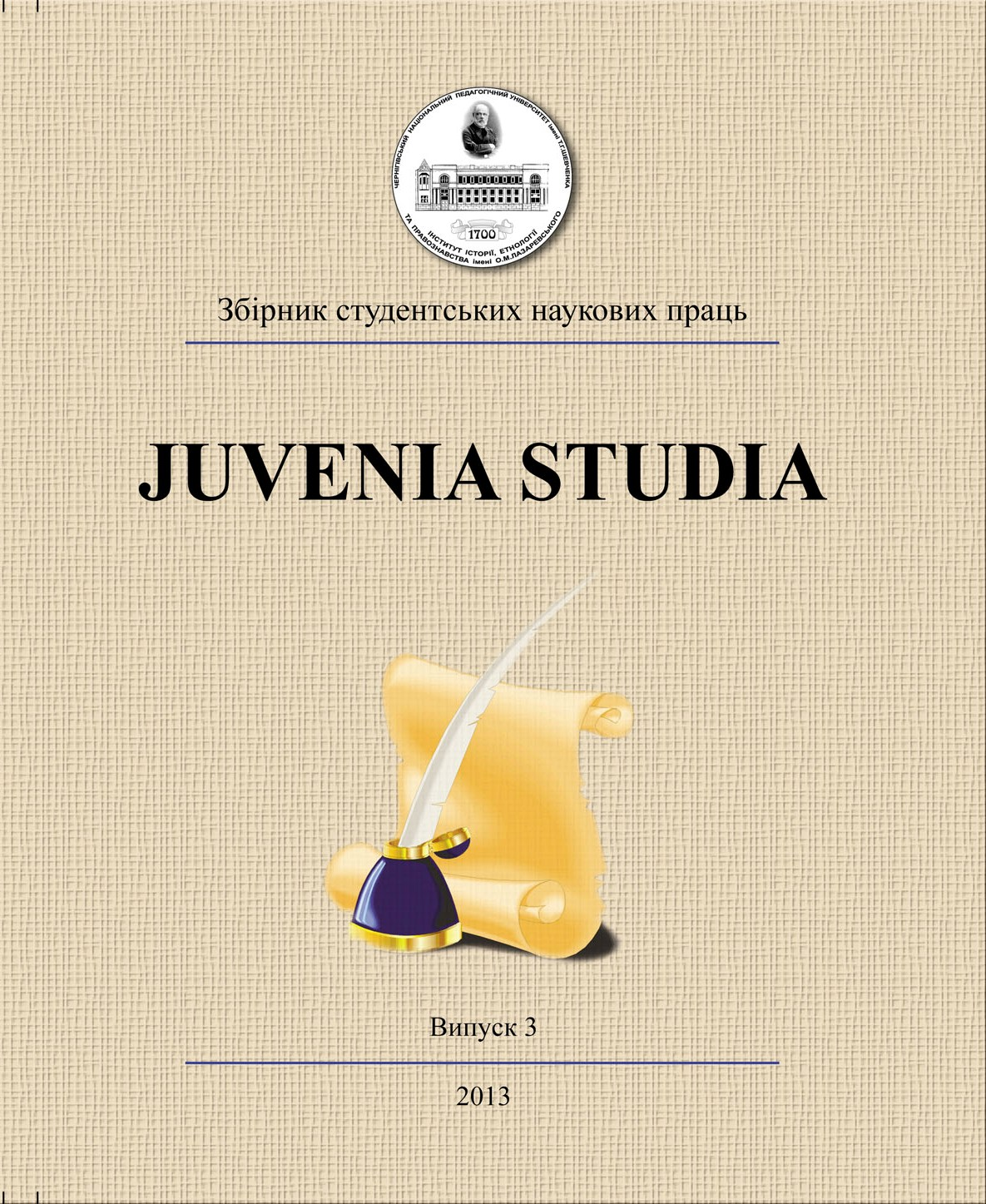 обкладинка студентського наукового збірника Juvenua Studia